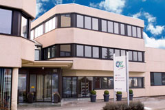 Verlagsgebäude Rheinfelden, Römerstraße 90